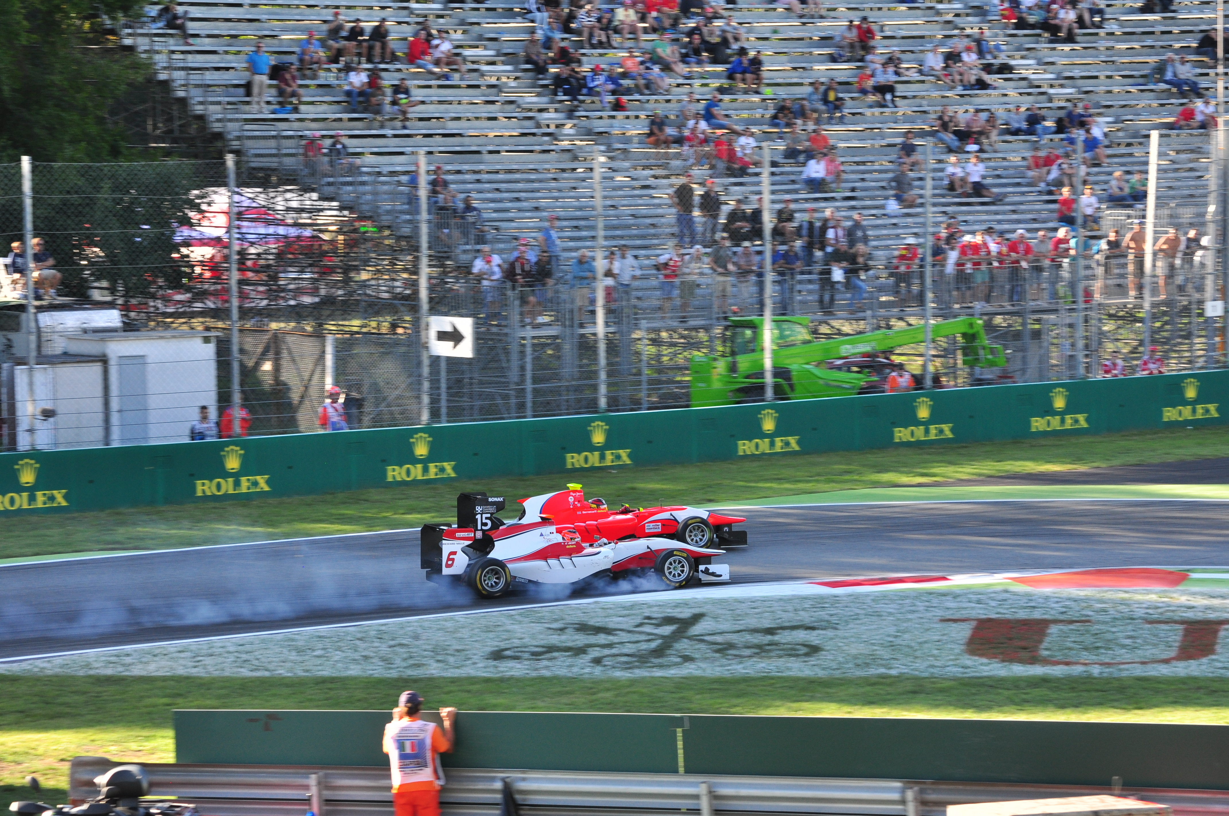 Photographie d'Esteban Ocon (n°6) dépassant Emil Bernstorff (n°15) à Monza en GP3 Series en 2015.